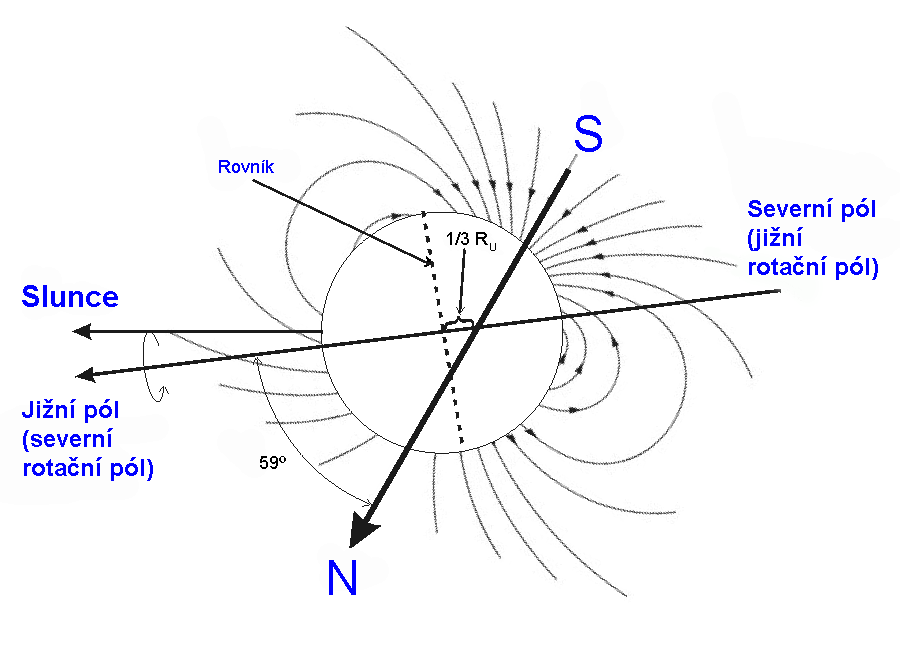 Toto schéma popisuje magnetické pole Uranu tak, jak jej změřila sonda Voyager 2 v roce 1986.